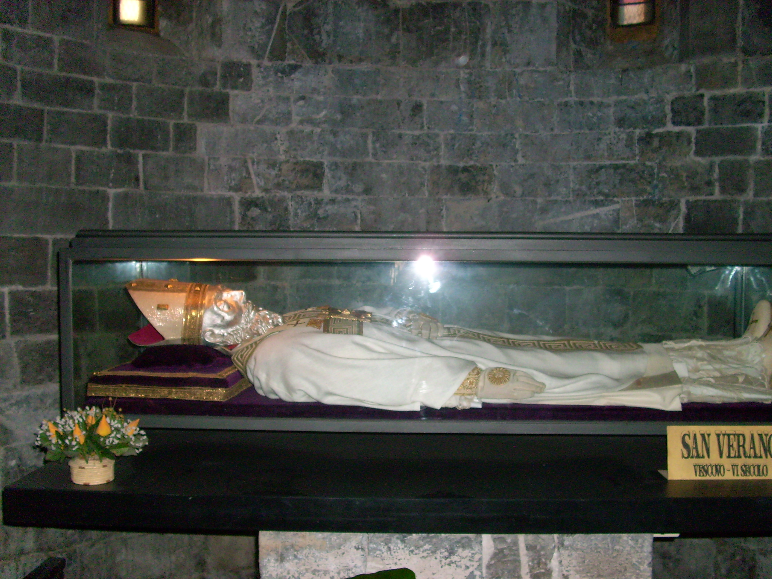 Spoglie di san Verano presso la Cattedrale di San Michele Arcangelo di Albenga, Liguria, Italia